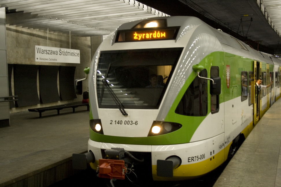 ER75-006 w barwach Kolei Mazowieckich na dworcu Warszawa Śródmieście